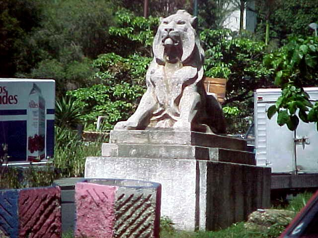 Puente de Los Leones (El Paraíso) en el municipio Libertador, Distrito Capital - Venezuela (2000)